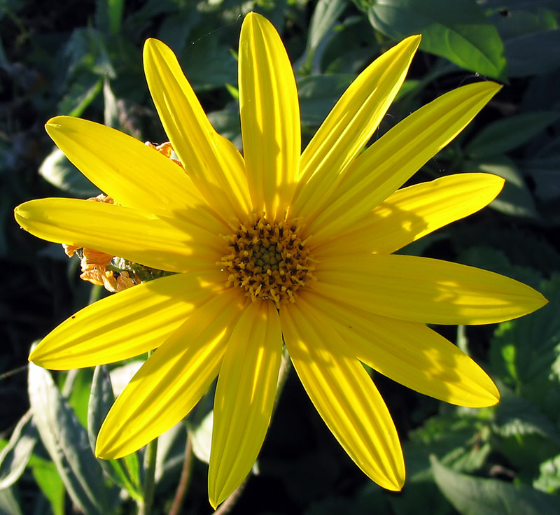 Blüte einer Topinambur (Helianthus tuberosus)